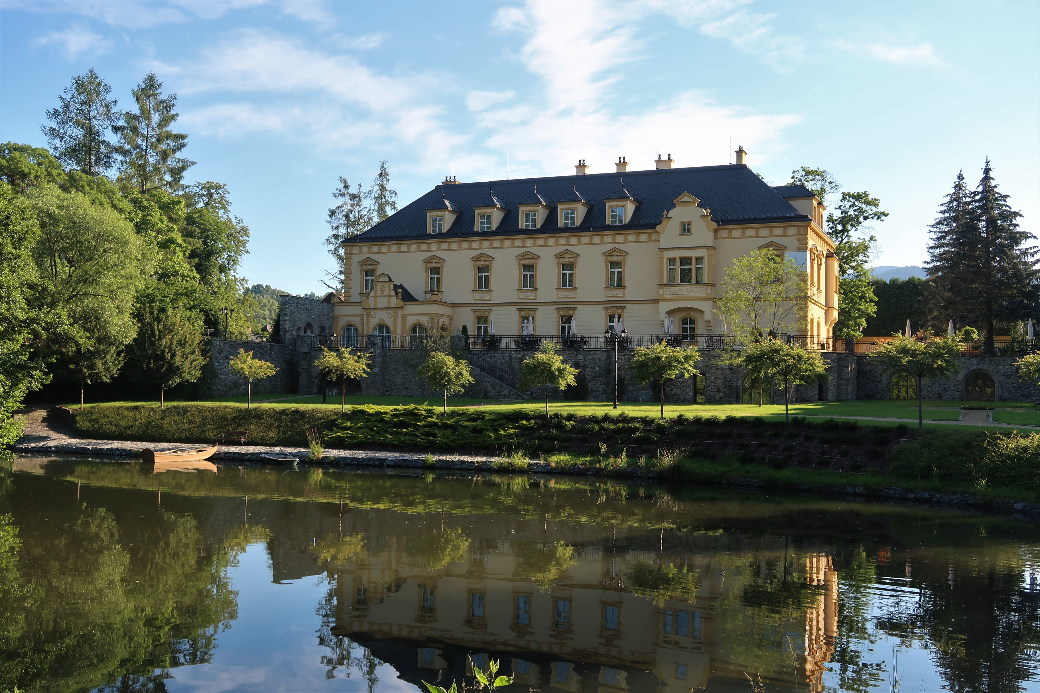 Sobotínský zámek z parku